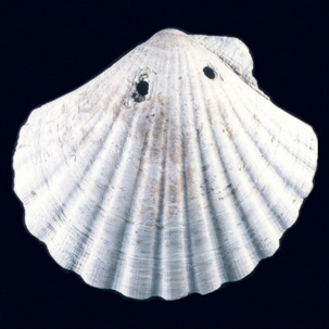 Pecten d'un pèlerin de Saint-Jacques de Compostelle.